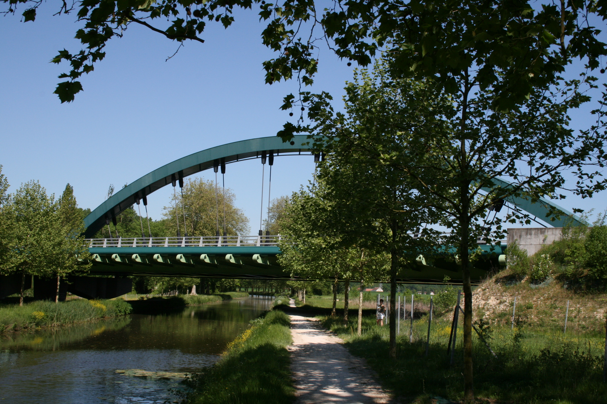 Viaduc de Pannes – pont en arc bowstring et ouvrage d’accès en bipoutre métallique. Franchit le Canal d’Orléans et la Bézonde – Département du Loiret (France)